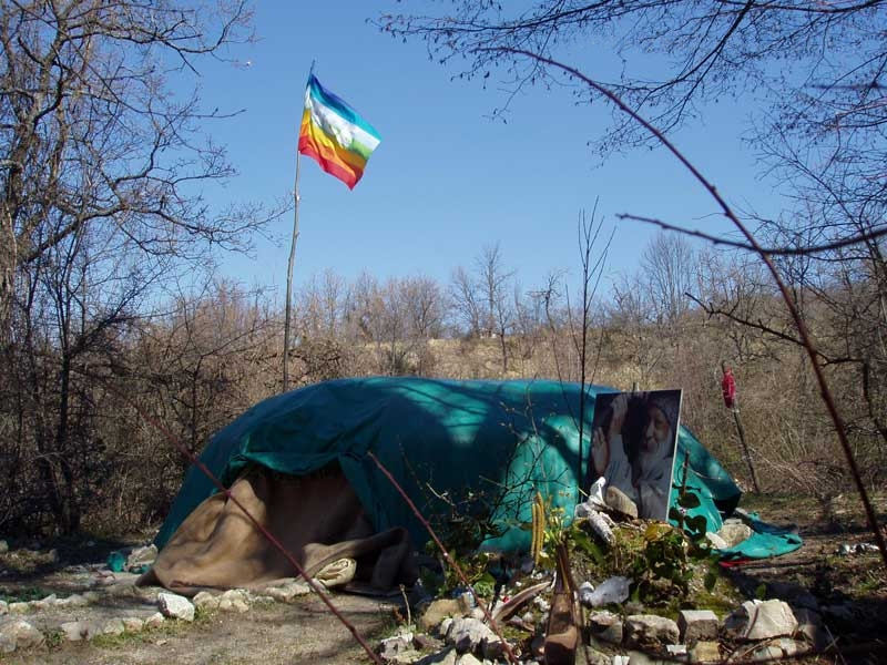 Descrizione: inipi coperto: dopo aver provveduto alla copertura con coperte e teli, e al fissaggio a terra per una maggiore tenuta, l'Inipi è pronto per essere usato. Note: davanti all'ingresso sono evidenti l'inizio del sentiero che porta al fuoco e la "montagna sacra" a destra dell'entrata. Fonte: Osho Circle School, Italia Autore: Osho Inipi Circle